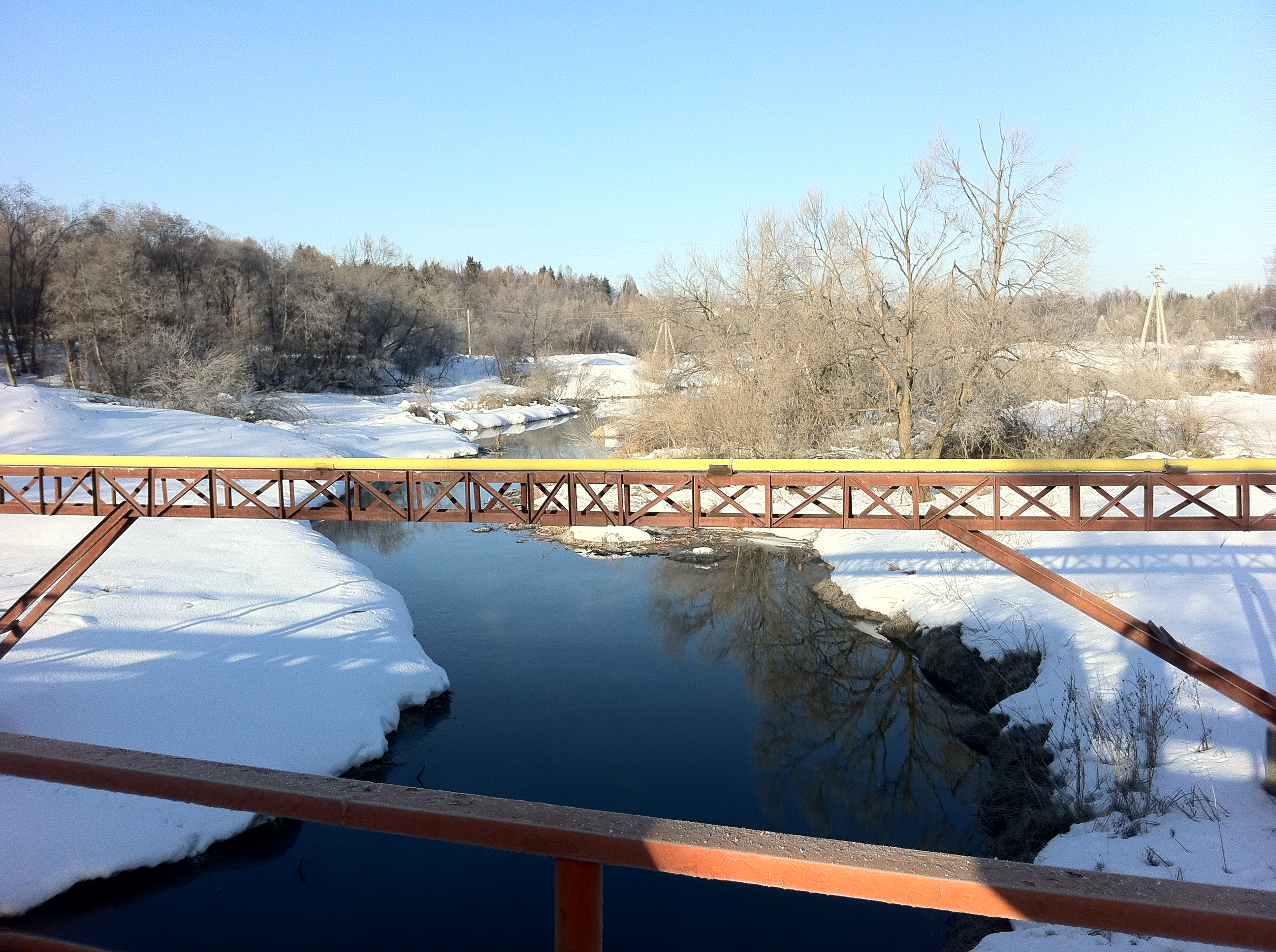 Река Десна. Снято с моста в деревне Афинеево.